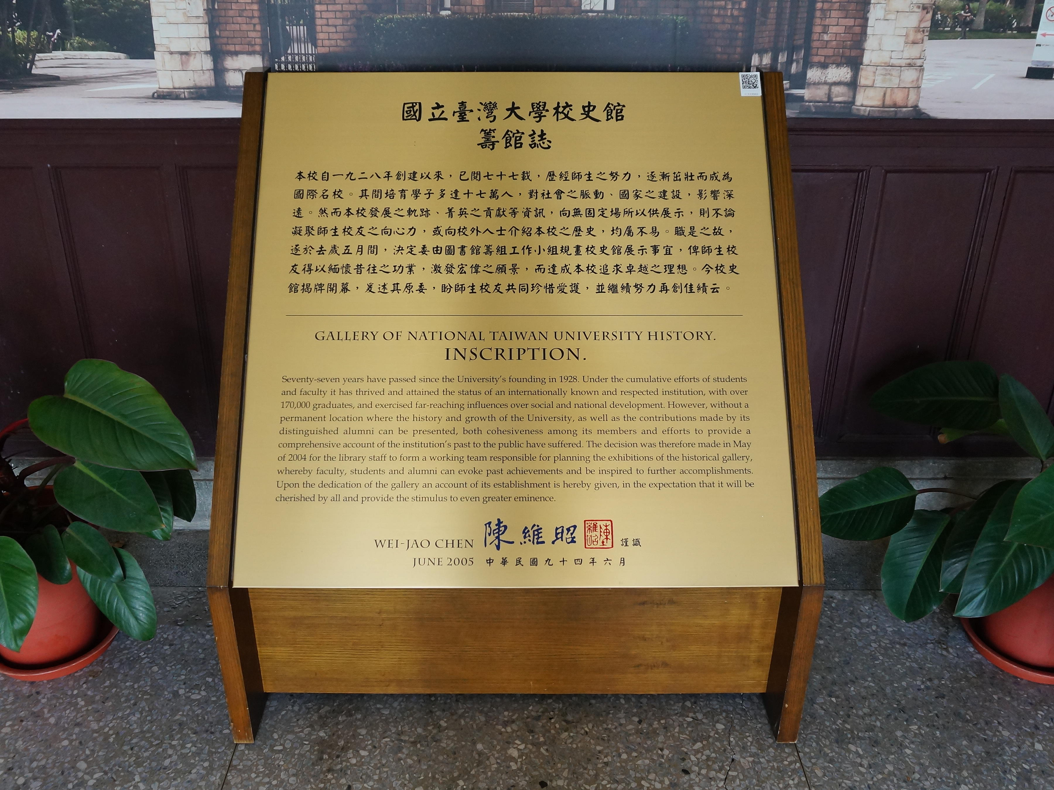 國立臺灣大學校史館籌館誌，2005年（中華民國94年）6月國立臺灣大學校長陳維昭署名，位於2樓大廳大門前。